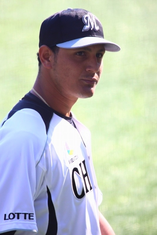 2013年日本プロ野球 千葉ロッテマリーンズ在籍 ウィル・レデズマ投手